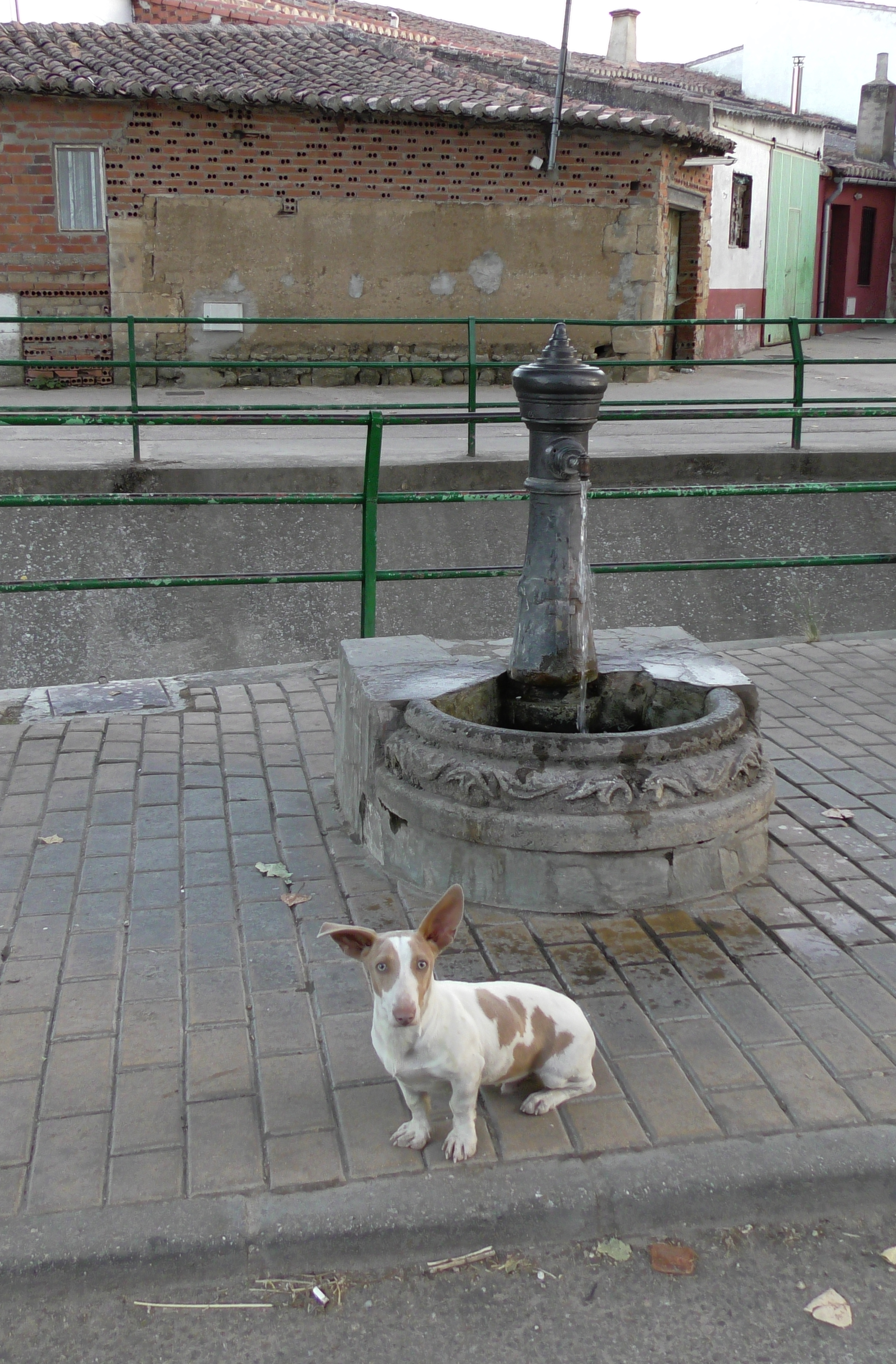 El Maderal